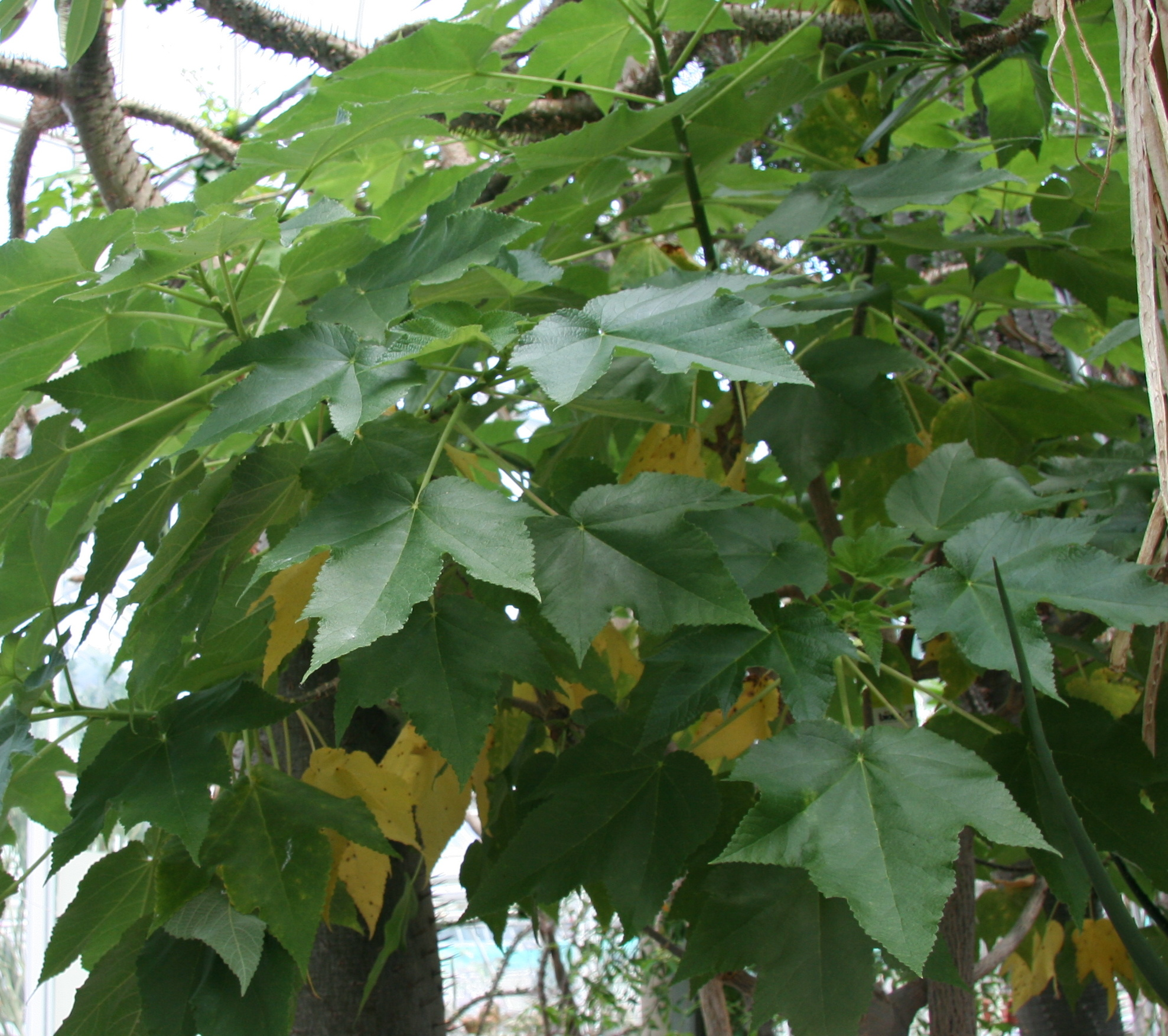 Obetia ficifolia in der Sukkulenten-Sammlung Zürich